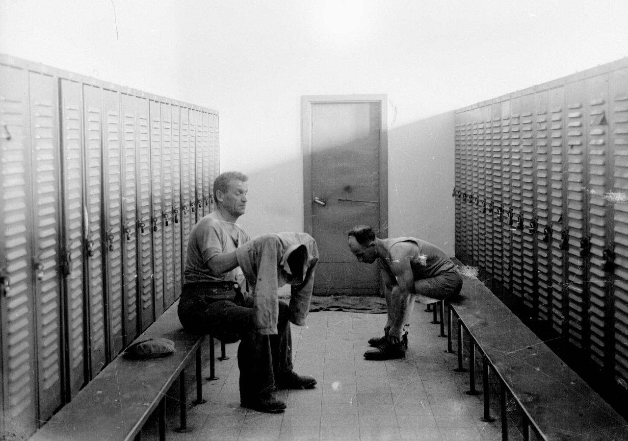 אוסף צילומים של הצלם זולטן קלוגר טווח מספרי התשלילים 23326 - 23333: בית חרושת "שמן", חיפה